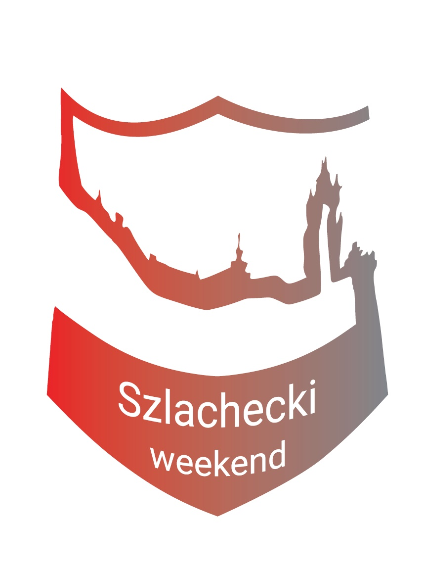 logotyp projektu Szlachecki weekend